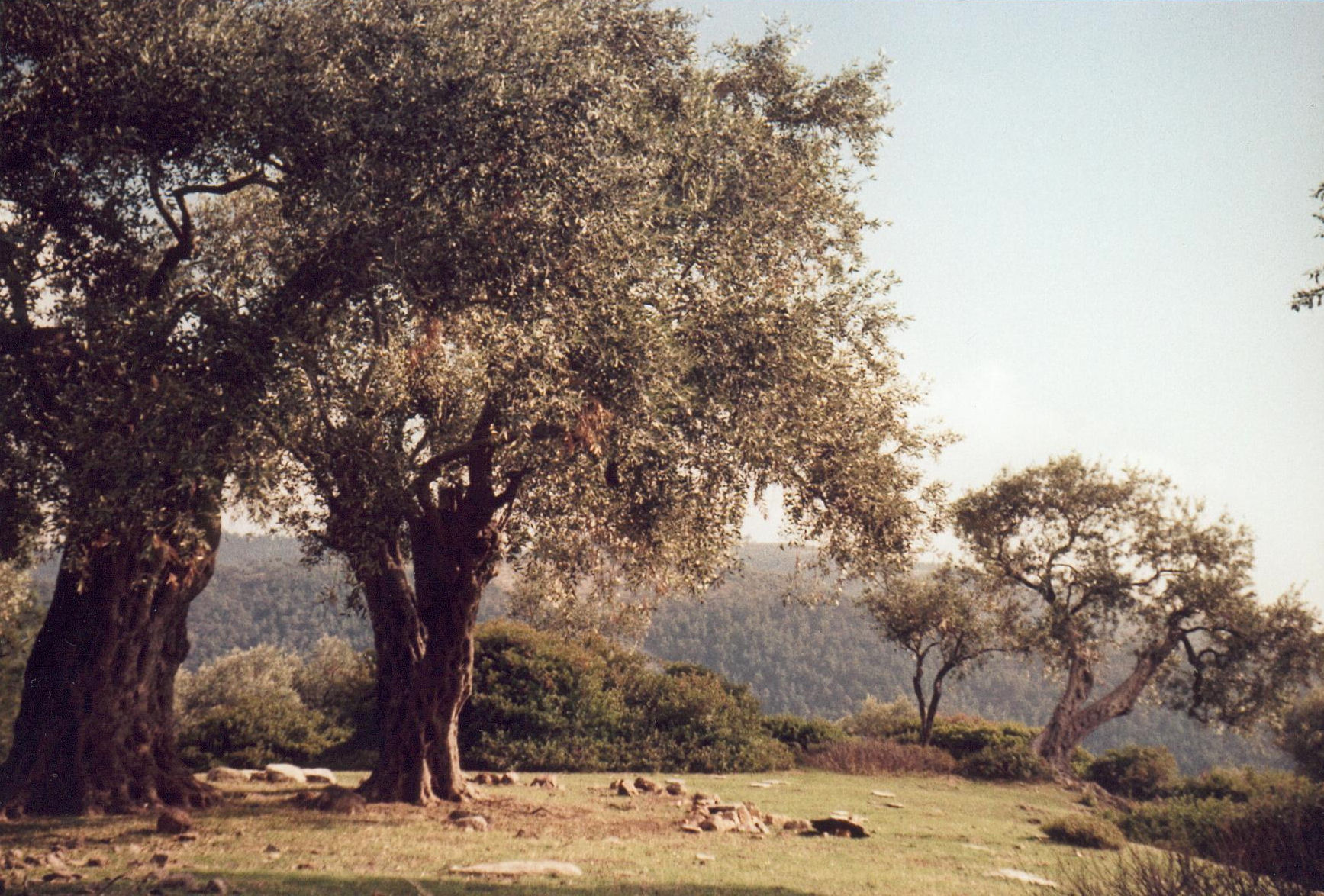 Olea europea-Echter Öelbaum auf Thasos